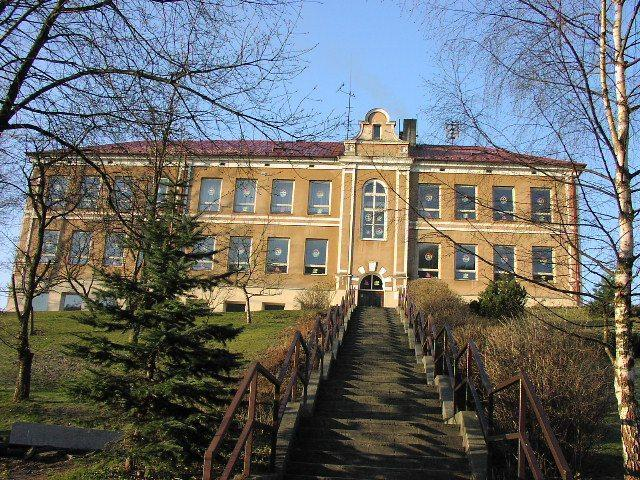 Škola v Holčovicích